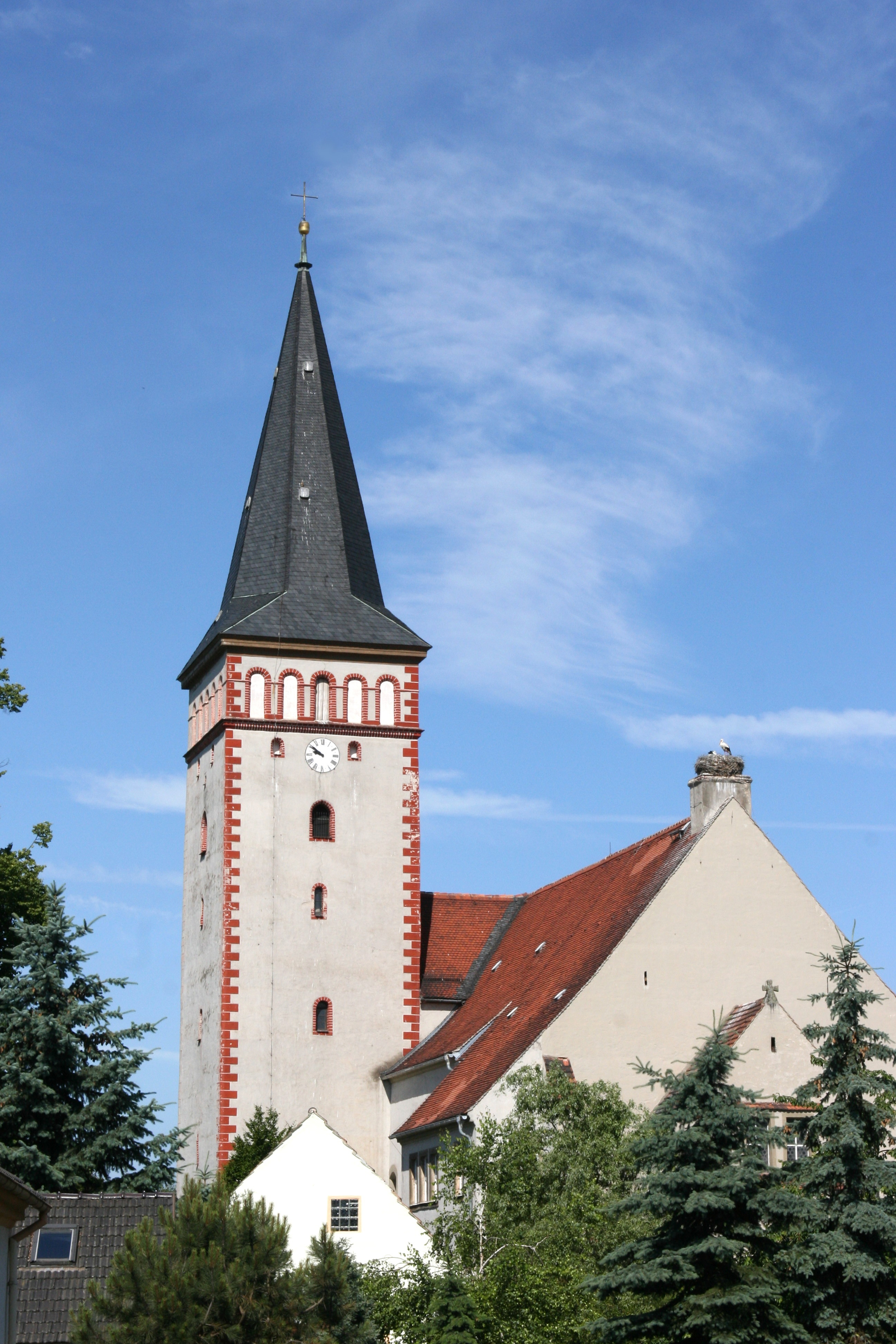 Evangelische Kirche, Straße der Einheit / Torgaer Straße in Kodersdorf